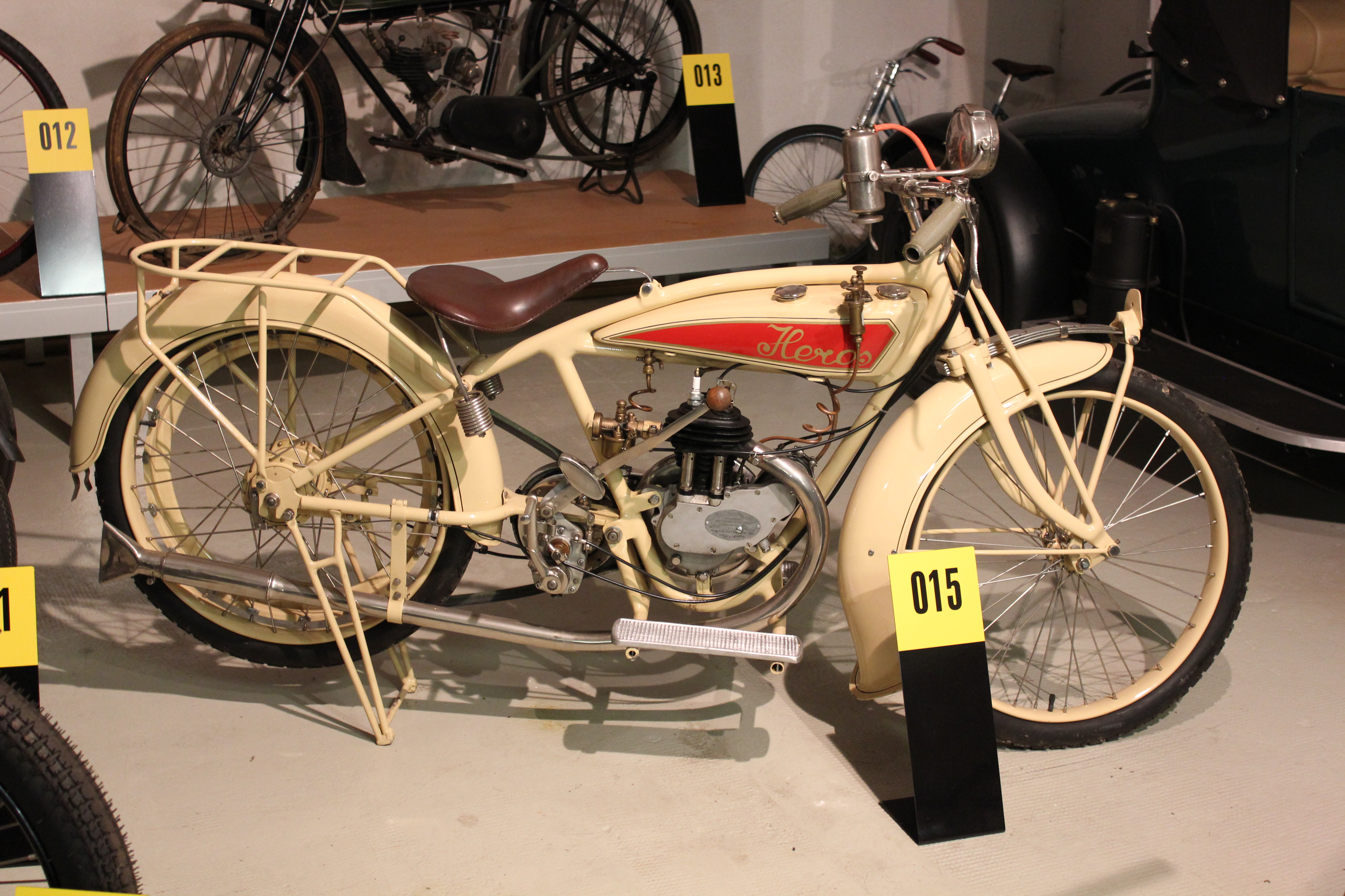 Heros Motorrad, Exponat des Museums für sächsische Fahrzeuge